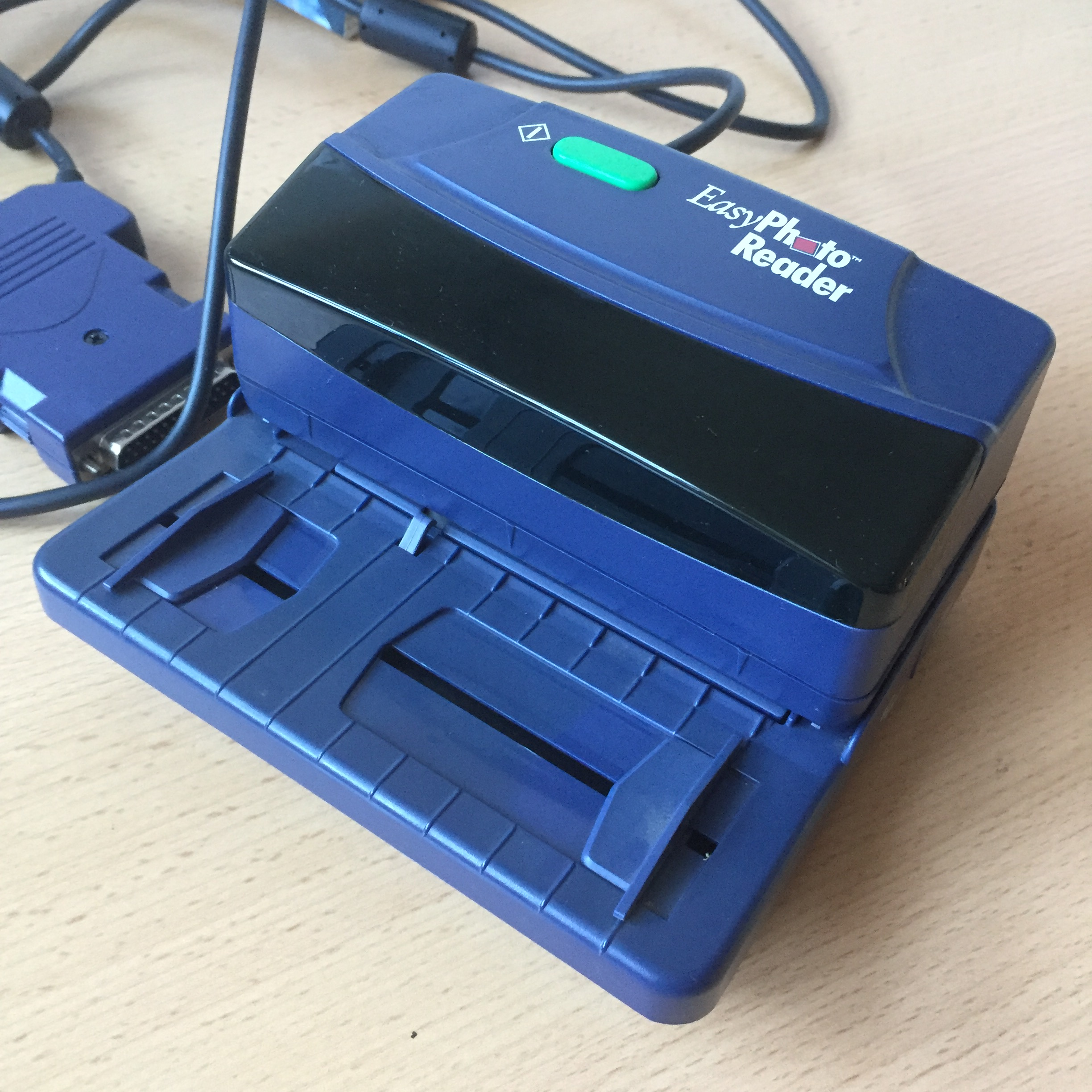 EasyPhoto-Reader - Foto-Scanner (1990er Jahre)